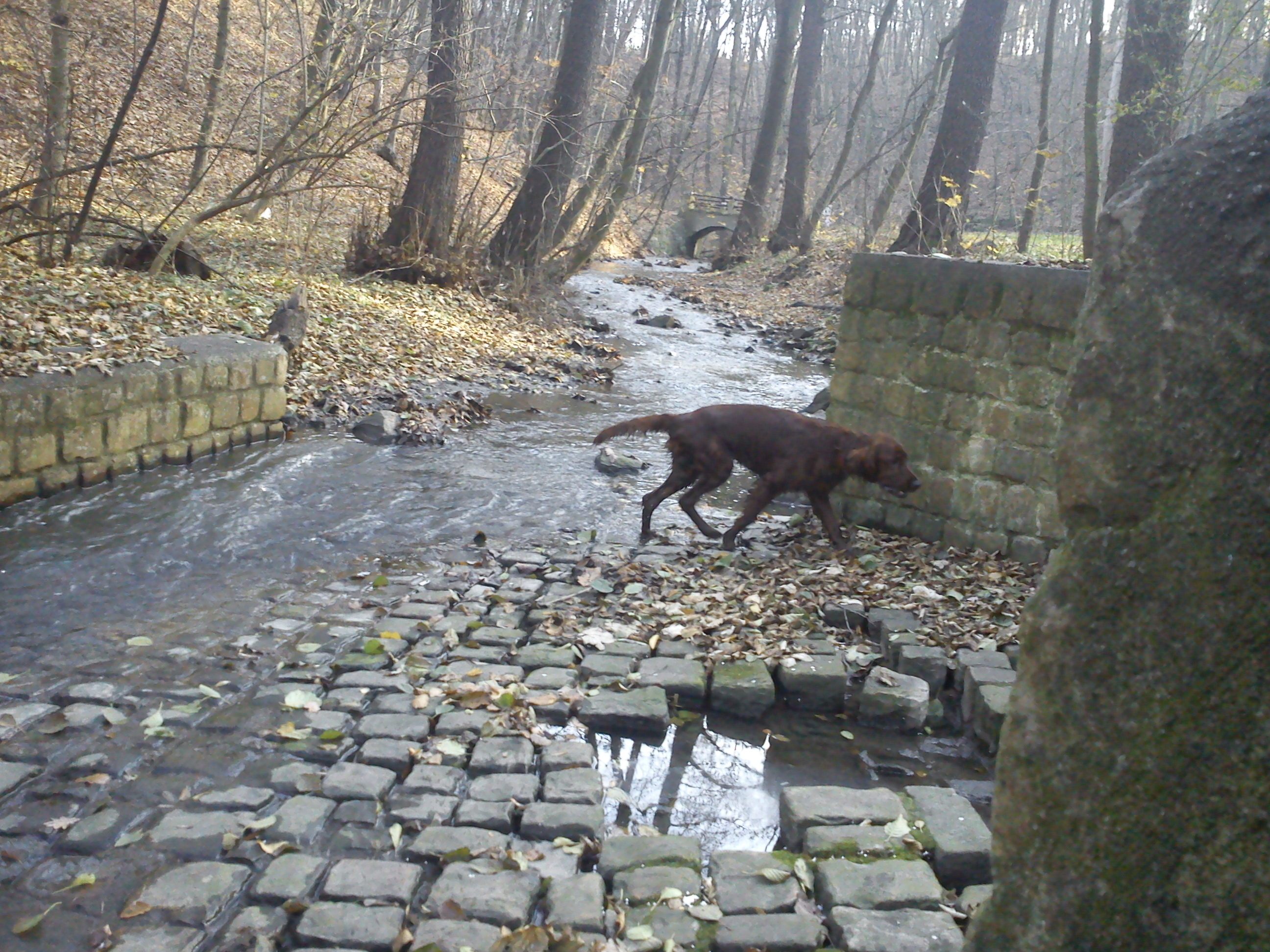 pes koupající se v potoce